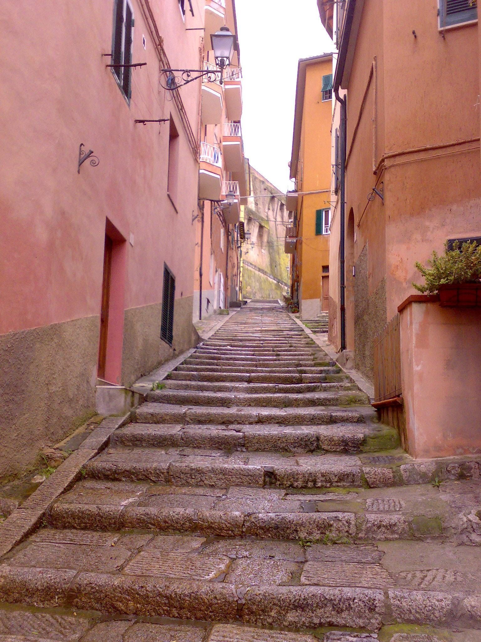 Caratteristica scalinata del centro storico di Porto S.Stefano.